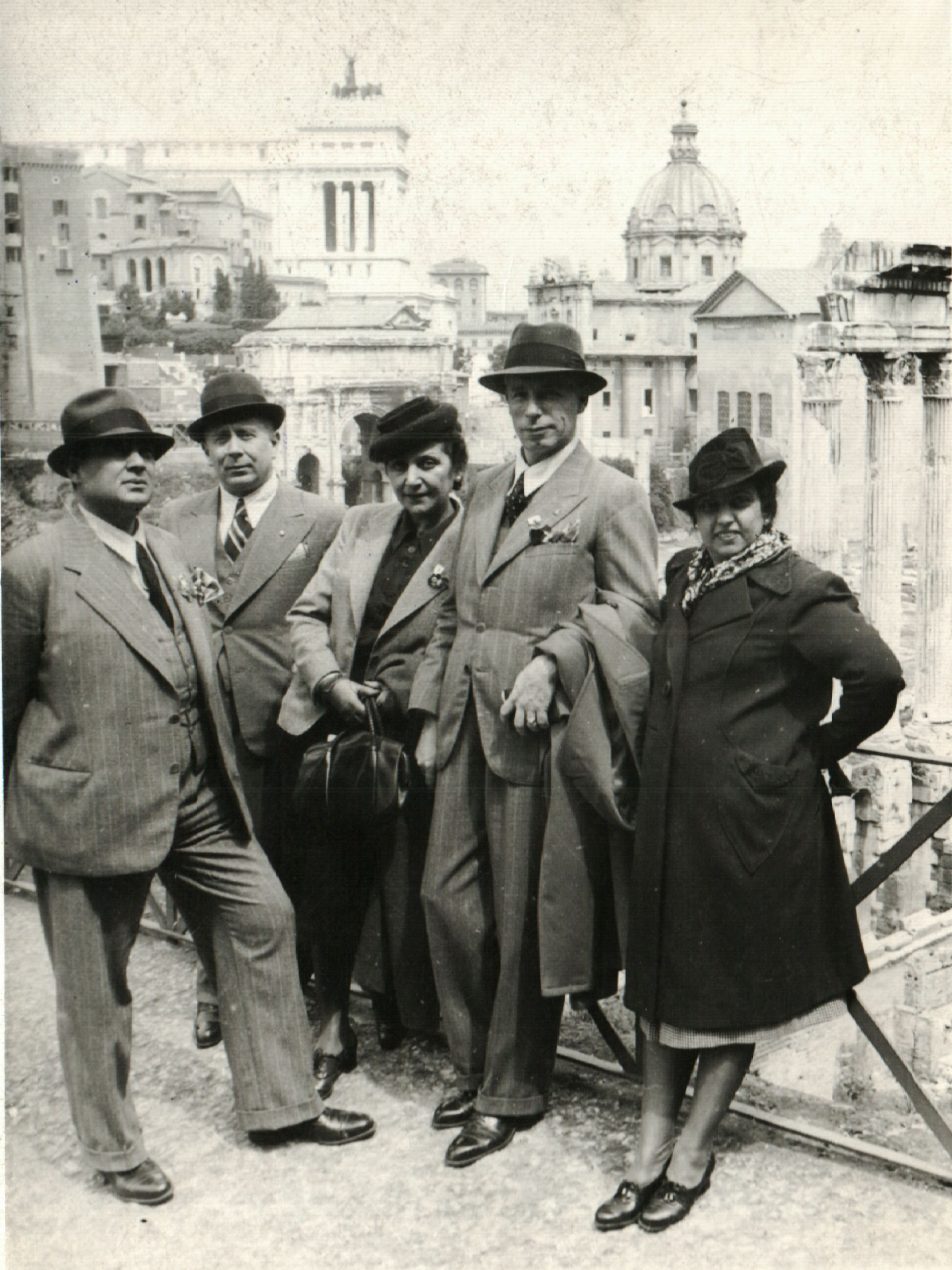 Групова снимка на инж. Стоян Митов в Рим, Италия.